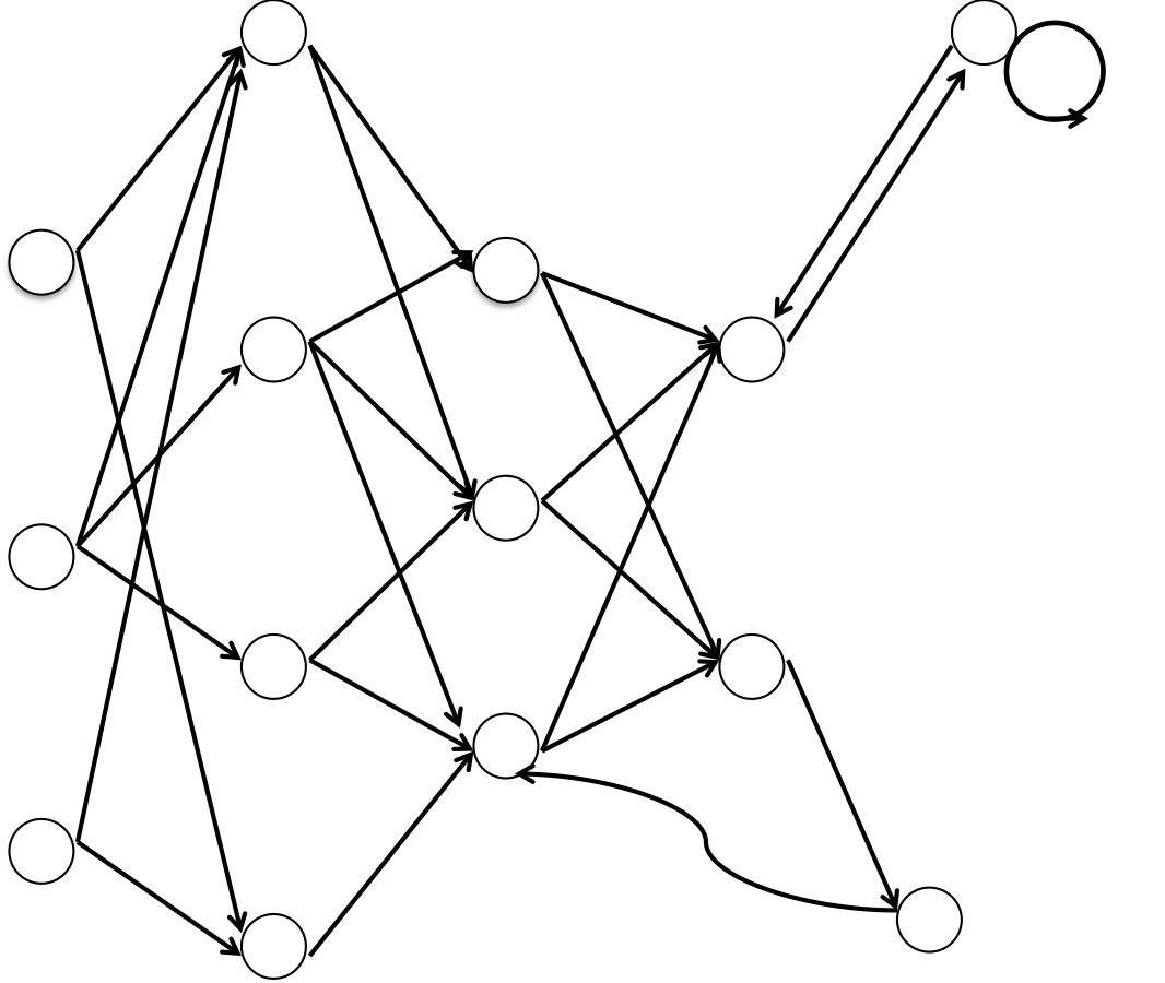 相互作用ニューラルネットワークの図